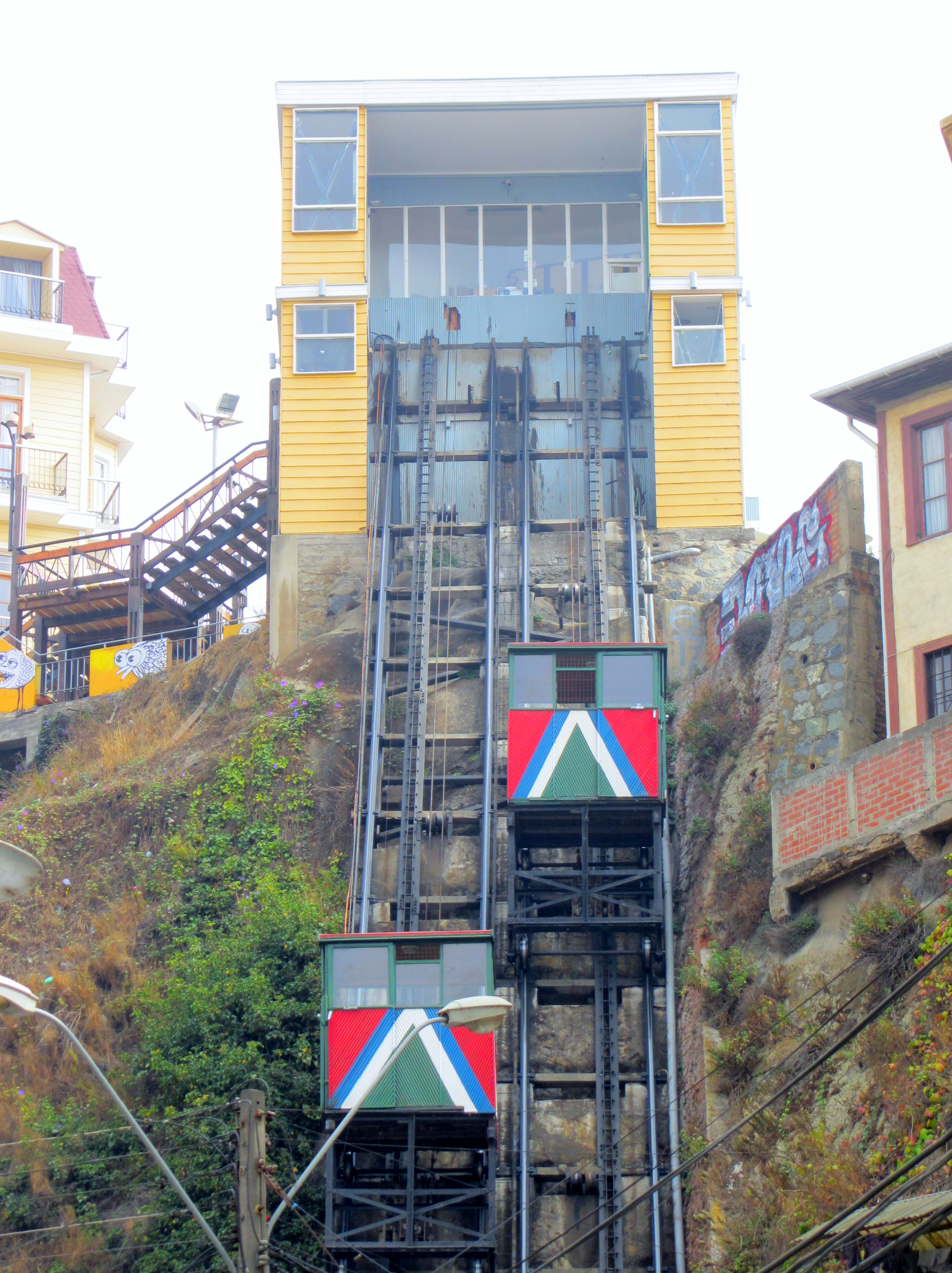 Vista, desde la calle Elías, de la estación alta del ascensor Reina Victoria, los rieles y las cabinas de subida y bajada, Valparaíso